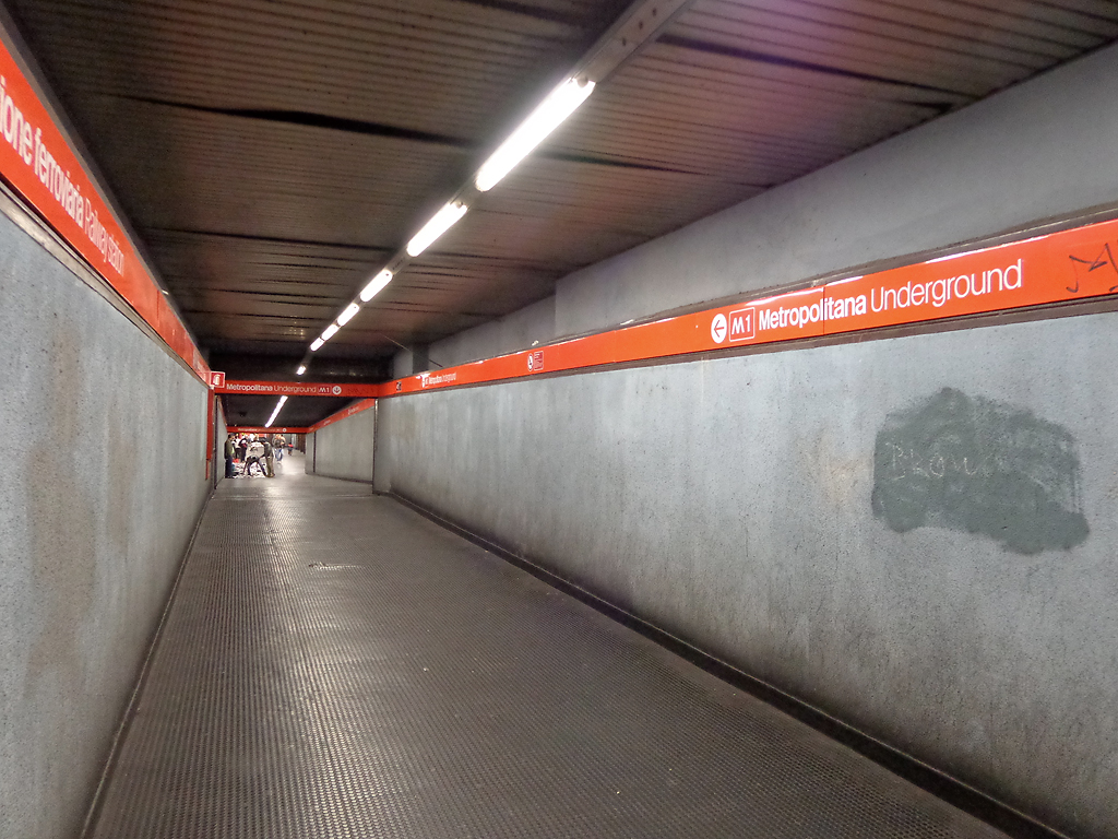 Sesto San Giovanni, fermata della metropolitana di Sesto I Maggio. Il corridoio di collegamento con la stazione ferroviaria.